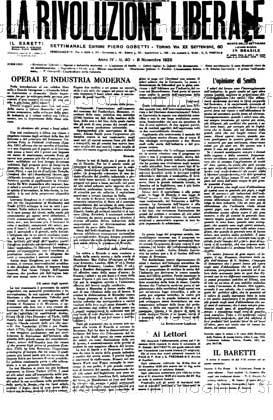 «La Rivoluzione Liberale», settimanale di Piero Gobetti: l'ultimo numero, dell'8 novembre 1925